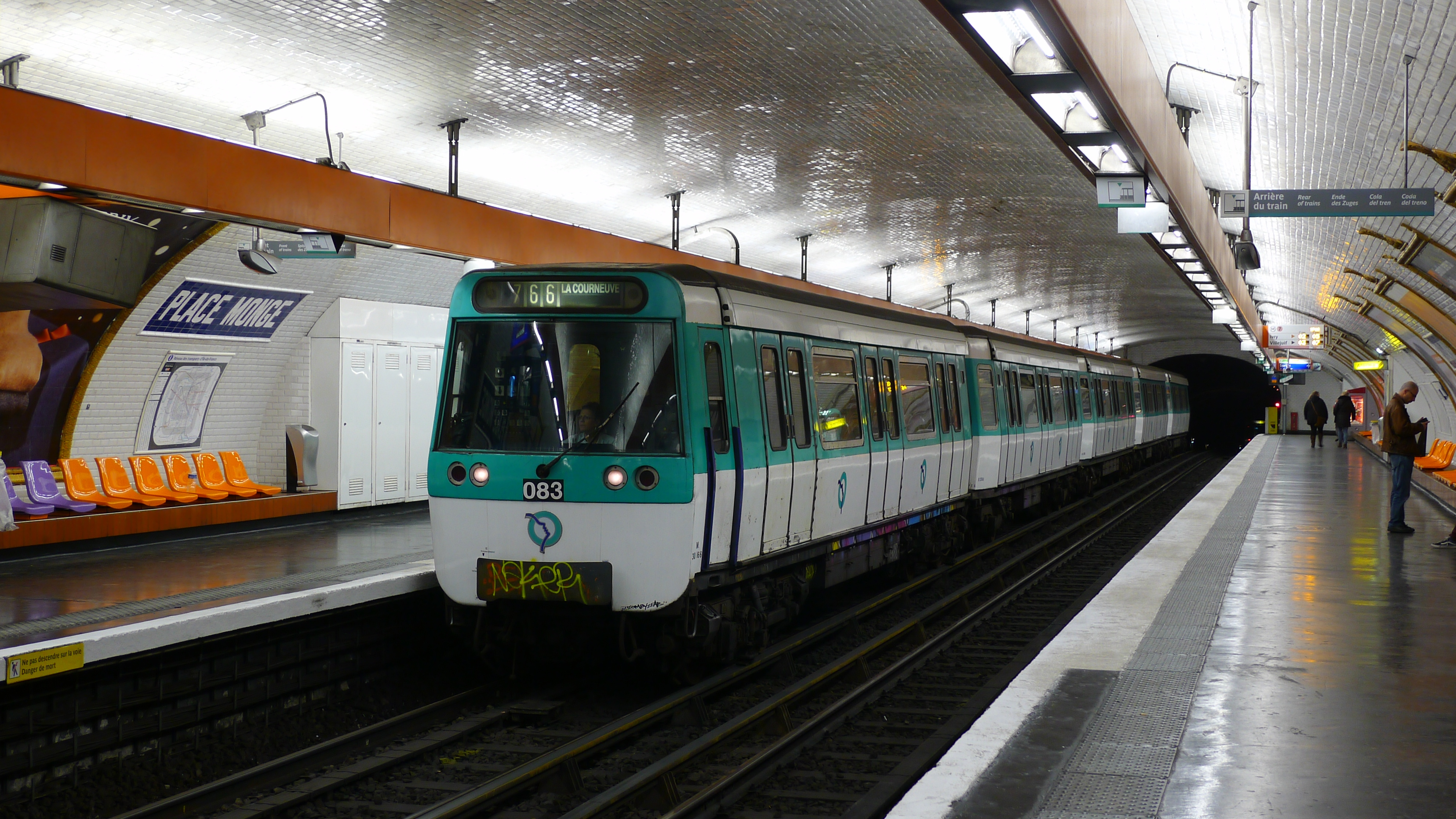 Métro MF77 n°083 de la Ratp sur la ligne 7 à la station Place Monge.